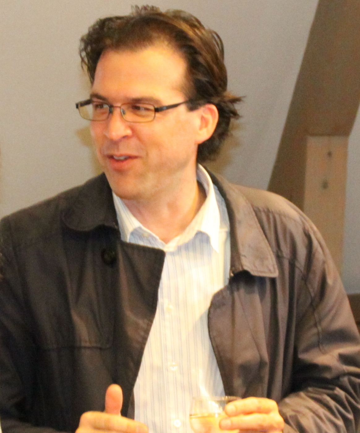 De Luc Marteling am November 2019 bei der Iwwereechung vun der Dicks-Rodange-Lenz Plack zu Izeg